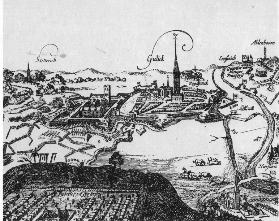 Belagerung der Stadt Jülich im jülich-klevischen Erbfolgebrieg 1610